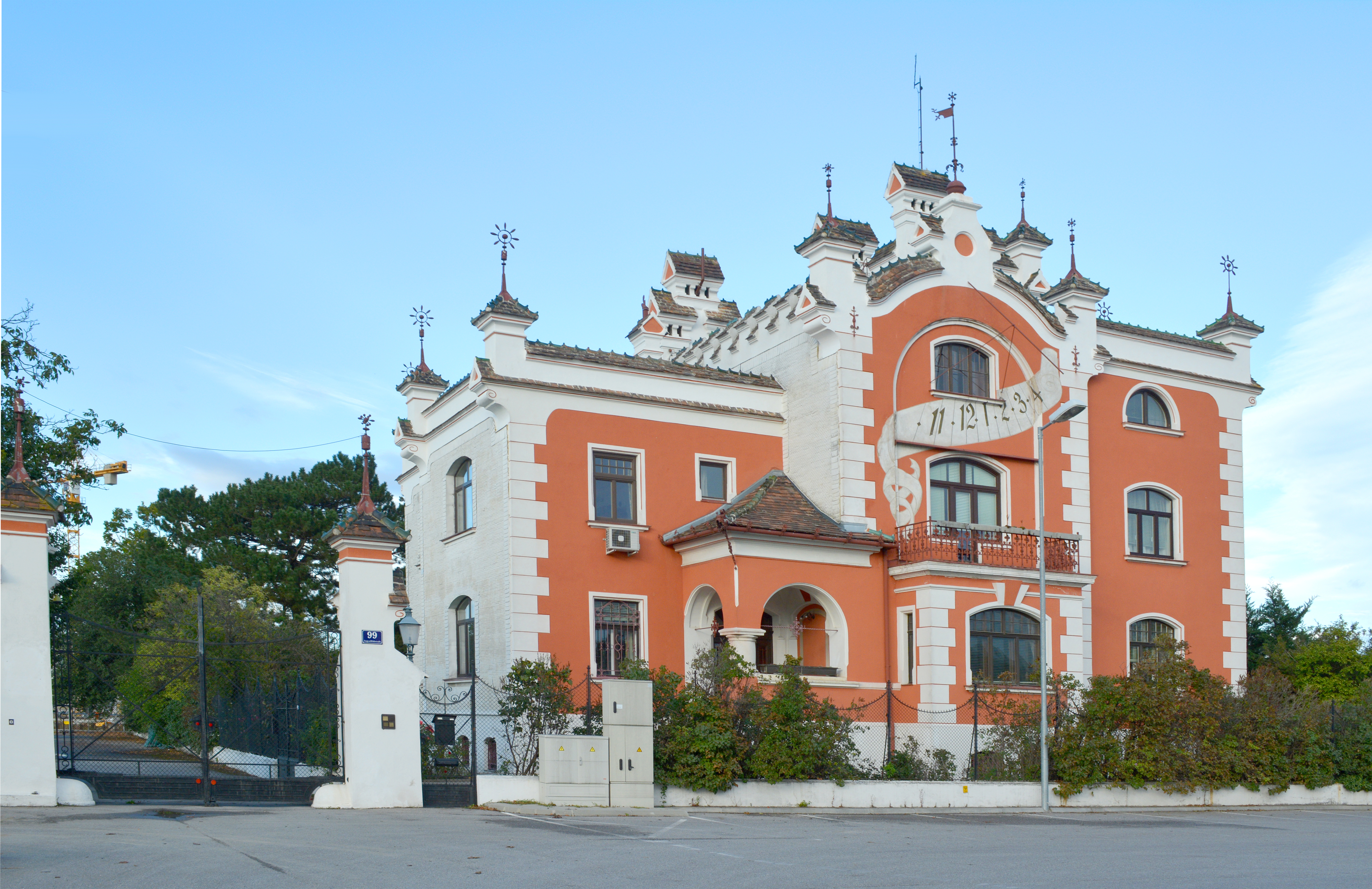 Georg Schicht, geb. 29. Juni 1849, gest. 14. Dezember 1913, war Unternehmer und Gründer einer Chemiefabrik und Bauherr der Schicht-Villa.